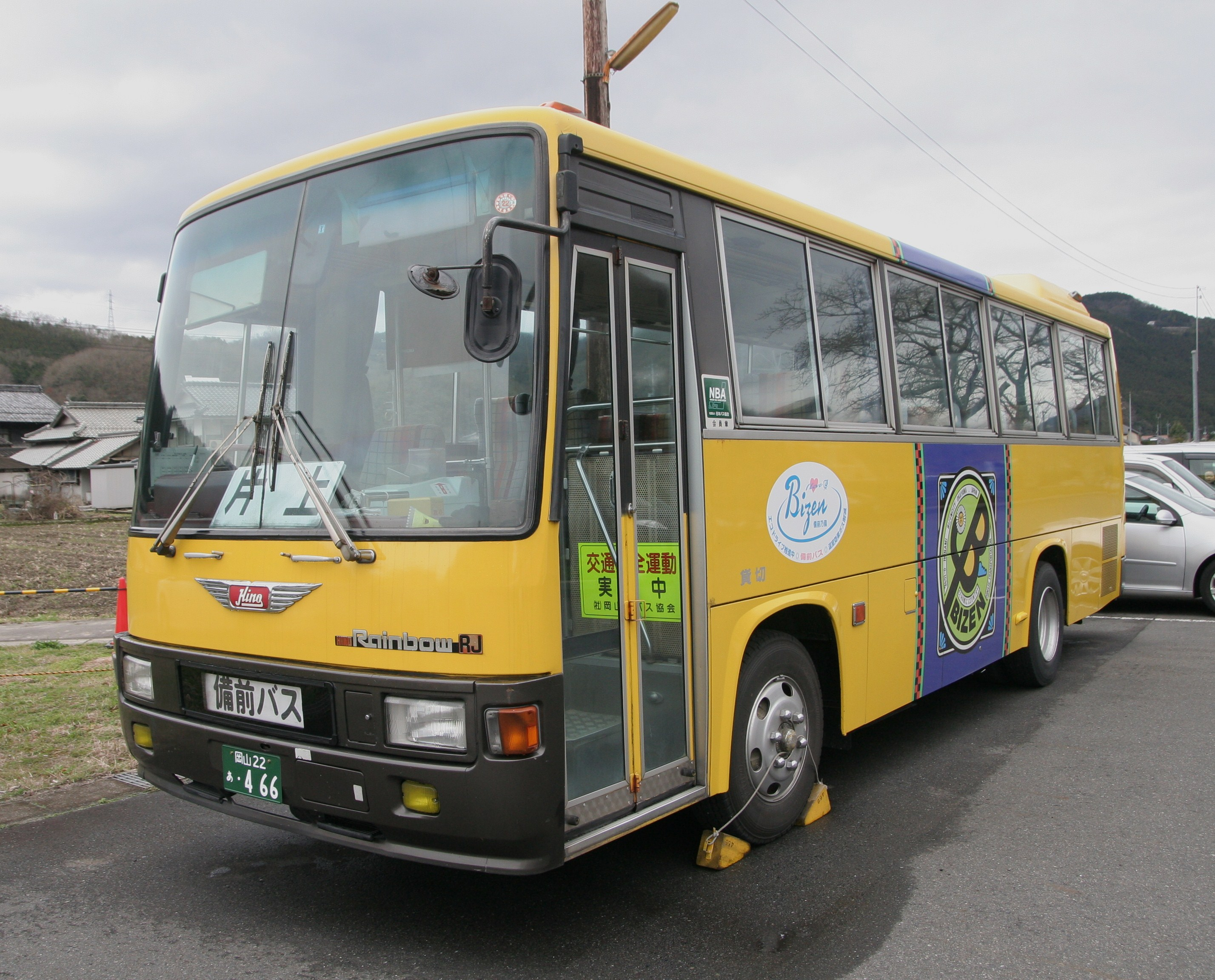 備前バス 日野レインボー 岡山22あ・466